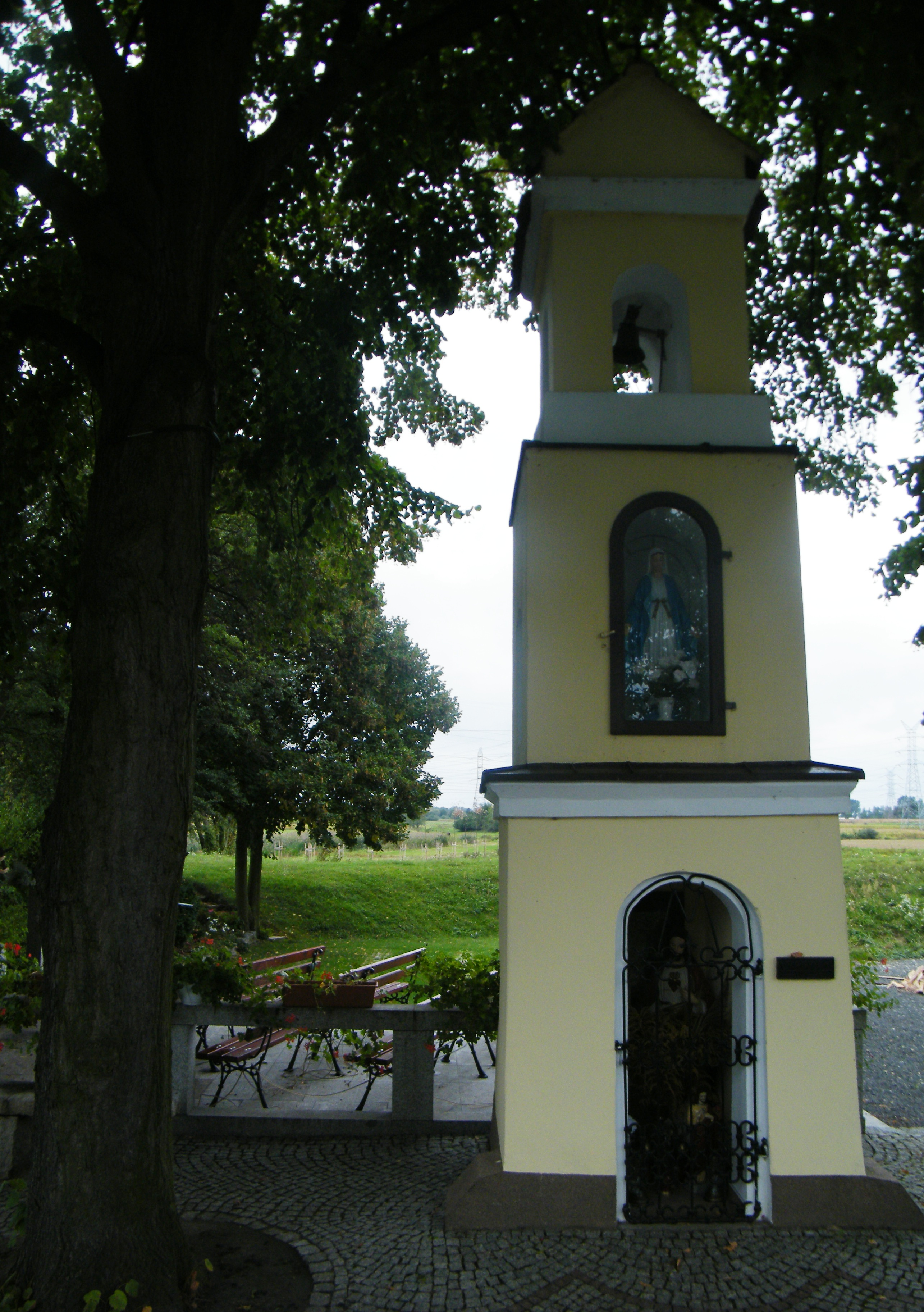 Opole Borki - kapliczka-dzwonnica, 2 poł. XVIII